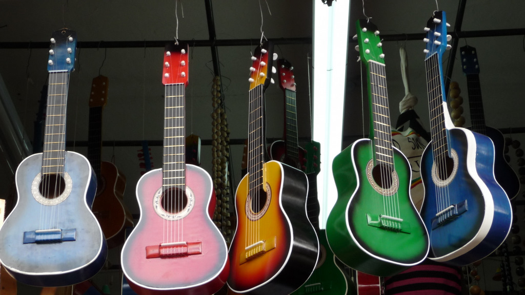 Guitarras en Chiquinquira, Boyaca, Colombia